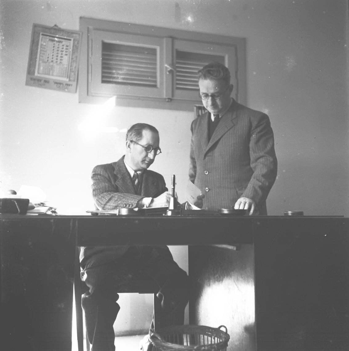 אוסף צילומים של הצלם זולטן קלוגר טווח מספרי התשלילים 23873 - 23927